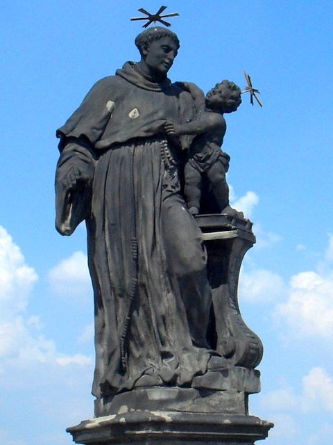 Praga, most Karola,św. Antoni z Padwy(Aw58)